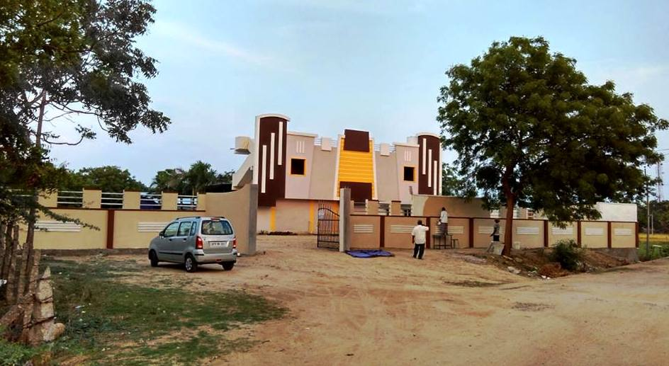 సుమంగళి ఫంక్షన్ హాల్